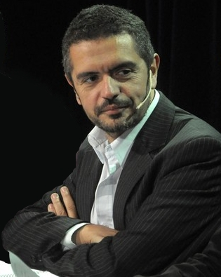 Leopoldo Brizuela, escritor argentino.